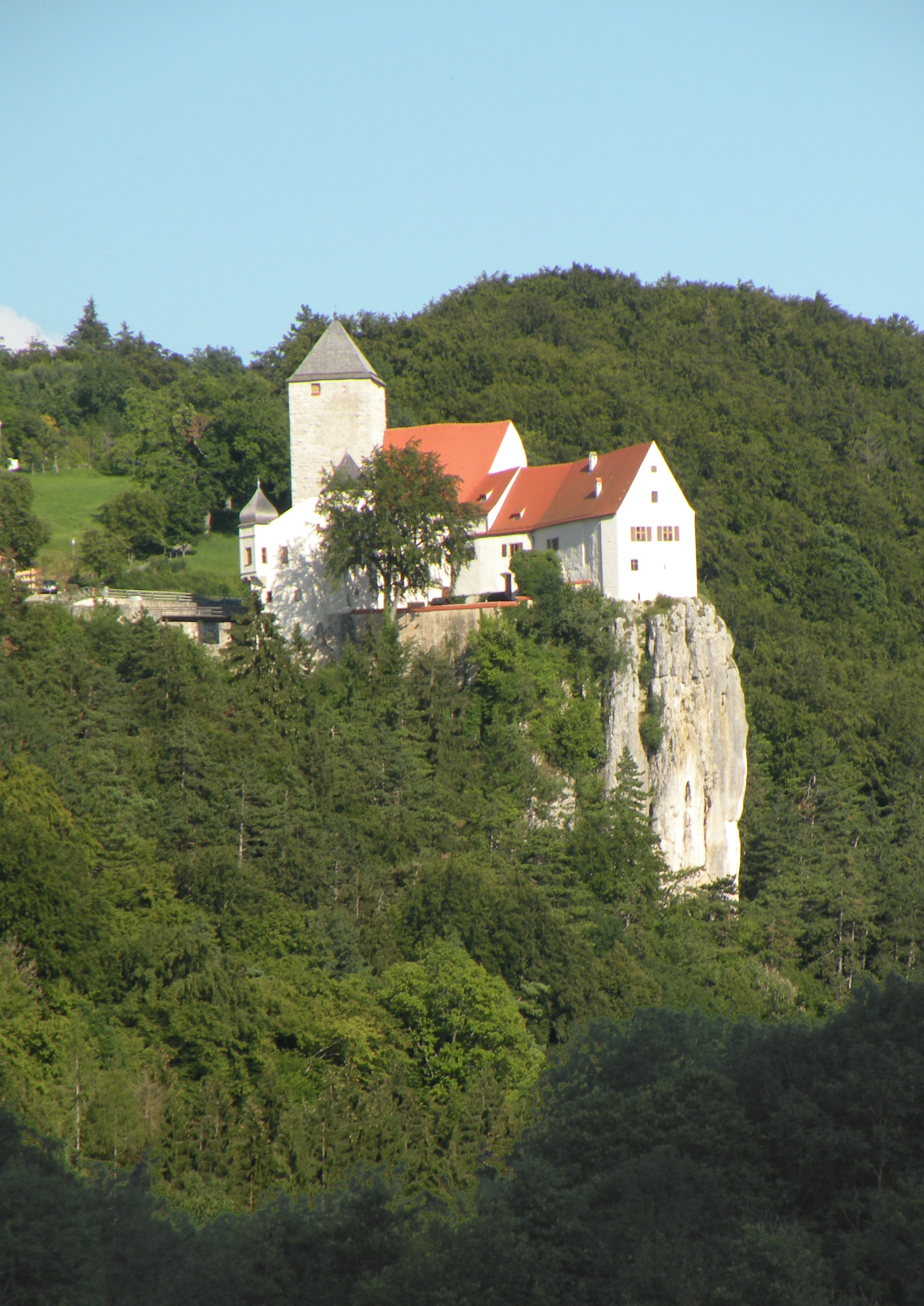 Schloss Prunn.